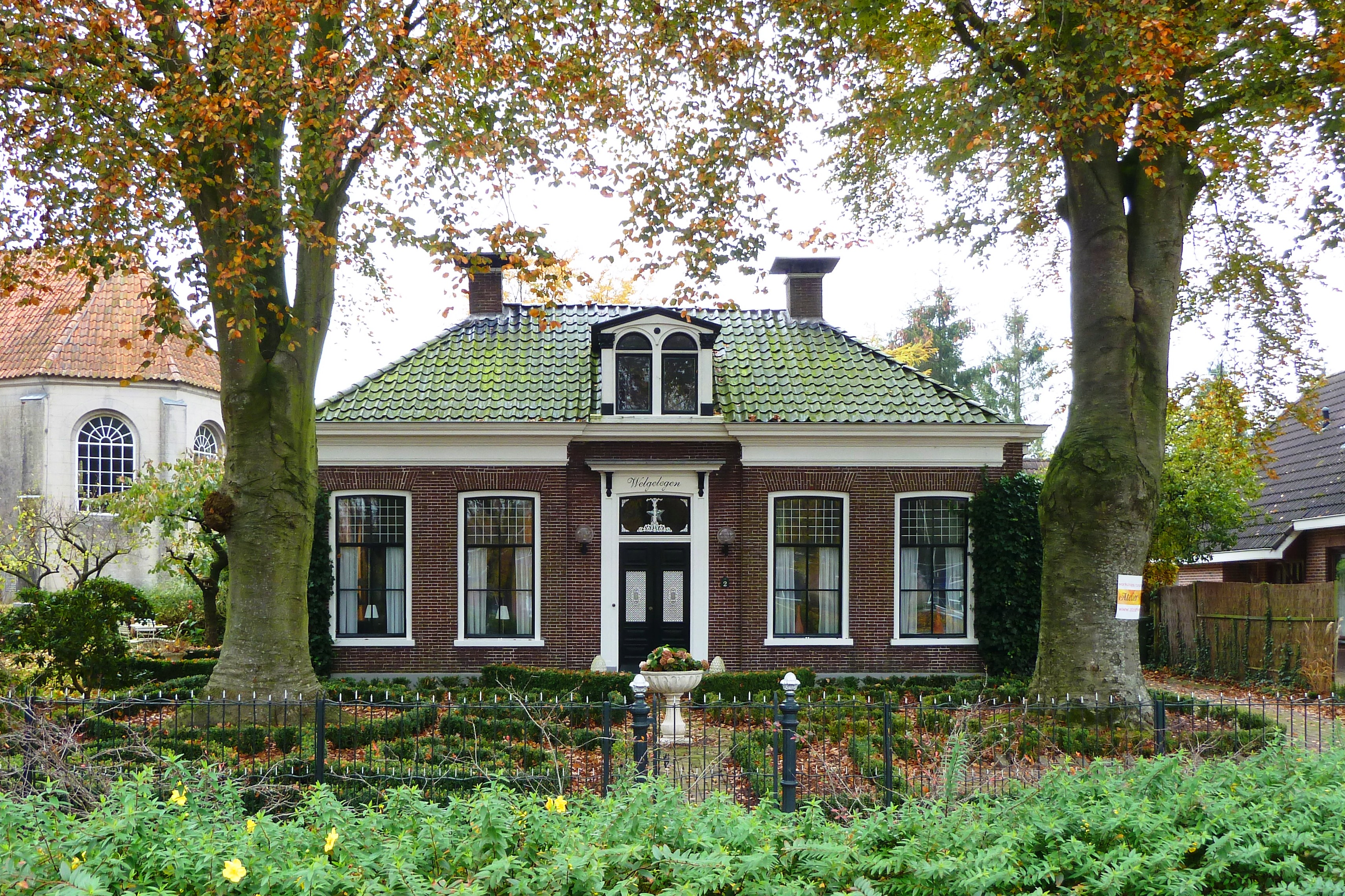 Het in neoclassicistische stijl opgetrokken Huis Welgelegen in Niekerk. Gebouwd in 1864 als schoolmeesterswoning. Sinds 2011 atelier.